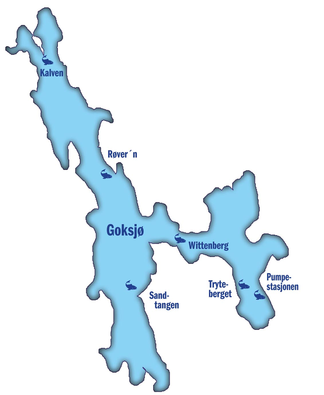 Bra fiskesteder i Goksjø.